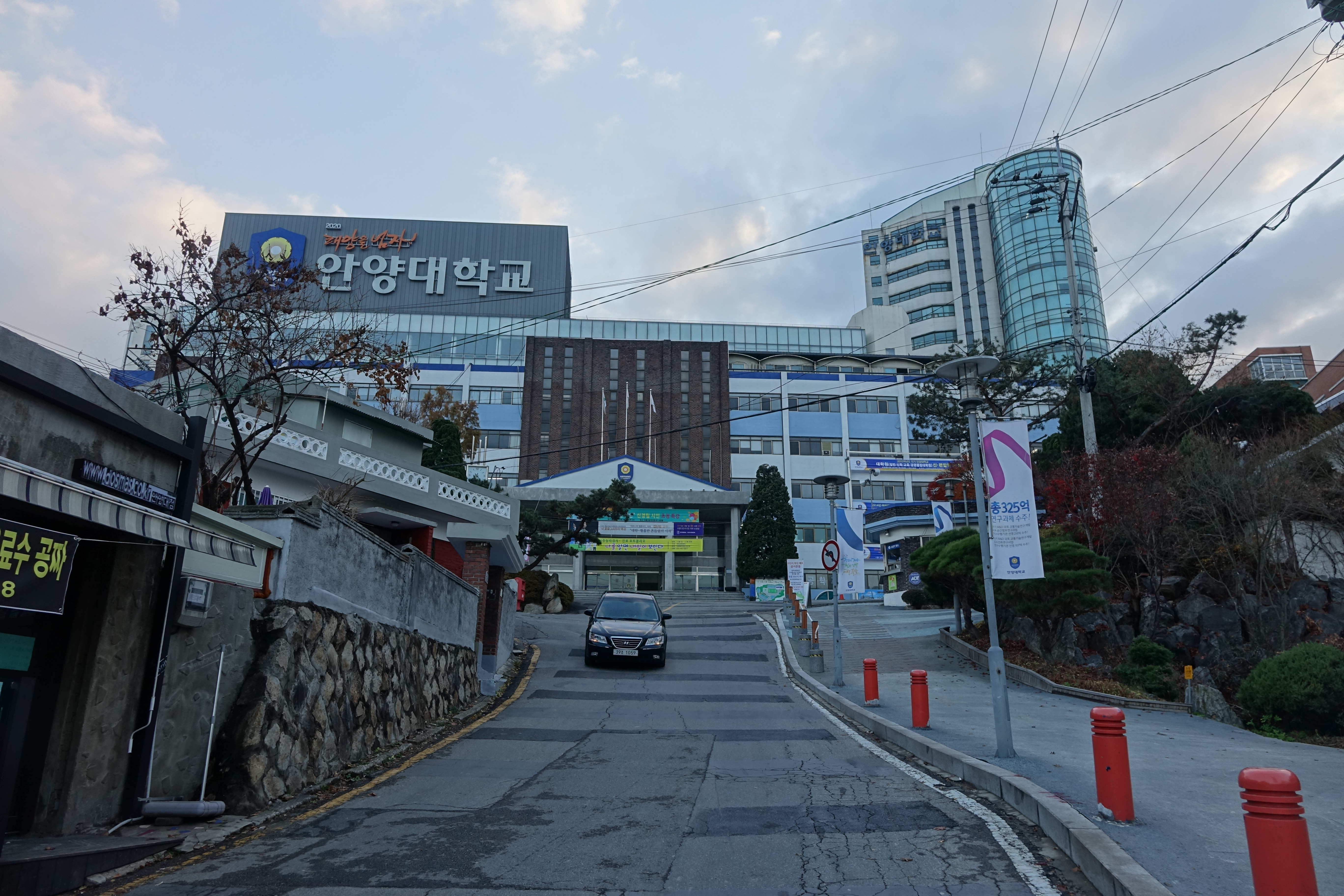 2014년 12월 20일 경 촬영(Kwangmo's SONY RX10)